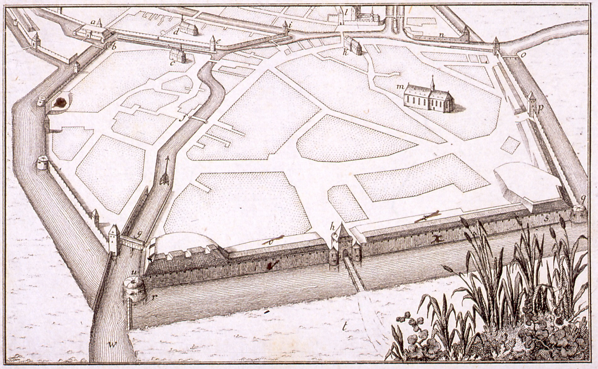 Gravure représentant la porte neuve à Strasbourg.